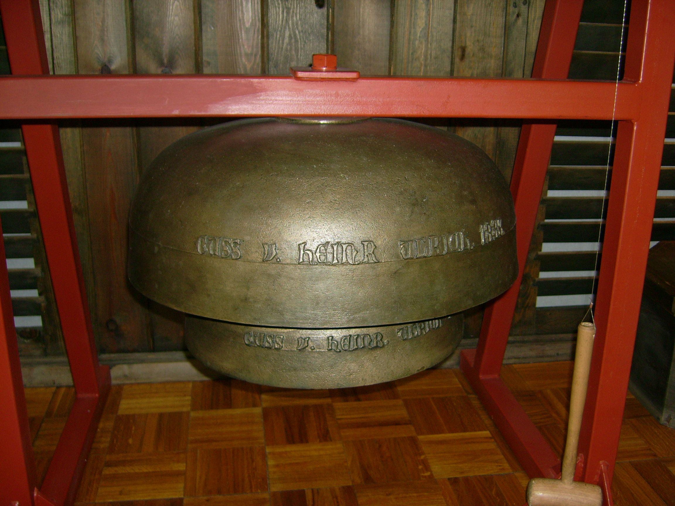 Knabenschule